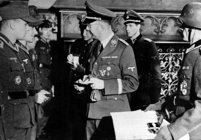 Himmler überreicht die Goldene Nahkampfspange Scherl Bilderdienst: Auszeichnung der Tapfersten Im Auftrag des Führers überreichte der Befehlshaber des Ersatzheeres, Reichsführer SS Heinrich Himmler, an 81 Angehörige des Heeres und der Waffen-SS, die im Saale des Rathauses einer süddeutschen Stadt angetreten waren, die Nahkampfspange in Gold. Jeder von diesen tapferen Soldaten hat mindestens fünfzig Mal Aug in Aug im Nahkampf dem Feinde gegenübergestanden. Aufnahme: SS-PK Ege 20.12.44 [Herausgabedatum] Abgebildete Personen: Himmler, Heinrich: Reichsführer der SS, Deutschland (GND 11855123X)